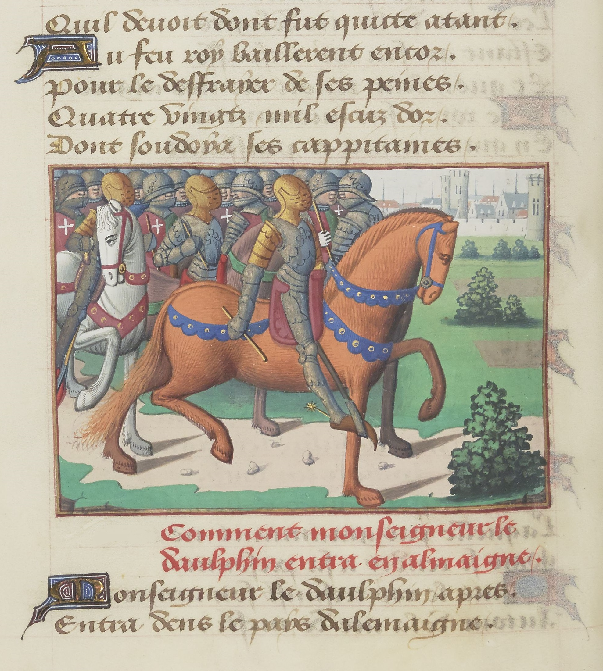 Partis de Langres, le dauphin Louis (futur Louis XI) et son armée composée de milliers d'écorcheurs entrent en Allemagne en août 1444 pour combattre les Suisses à la demande du duc d'Autriche.